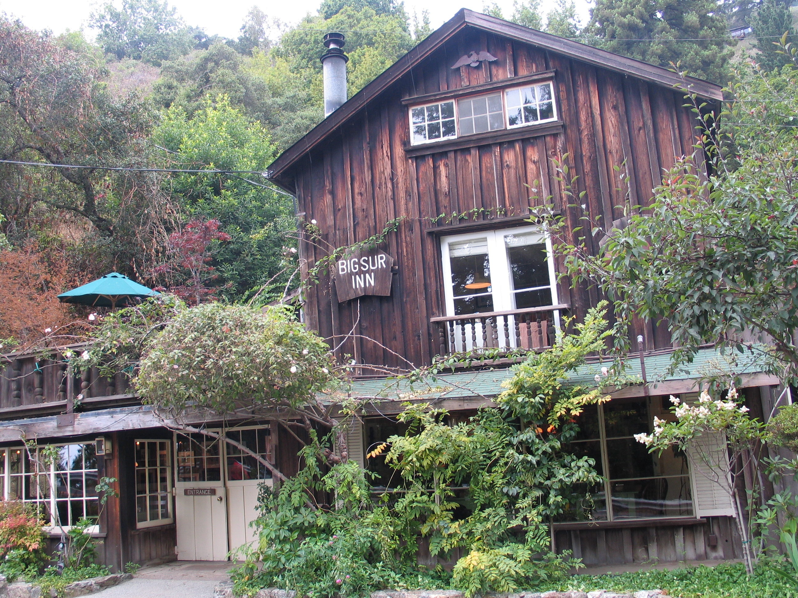 Deetjen's Big Sur Inn